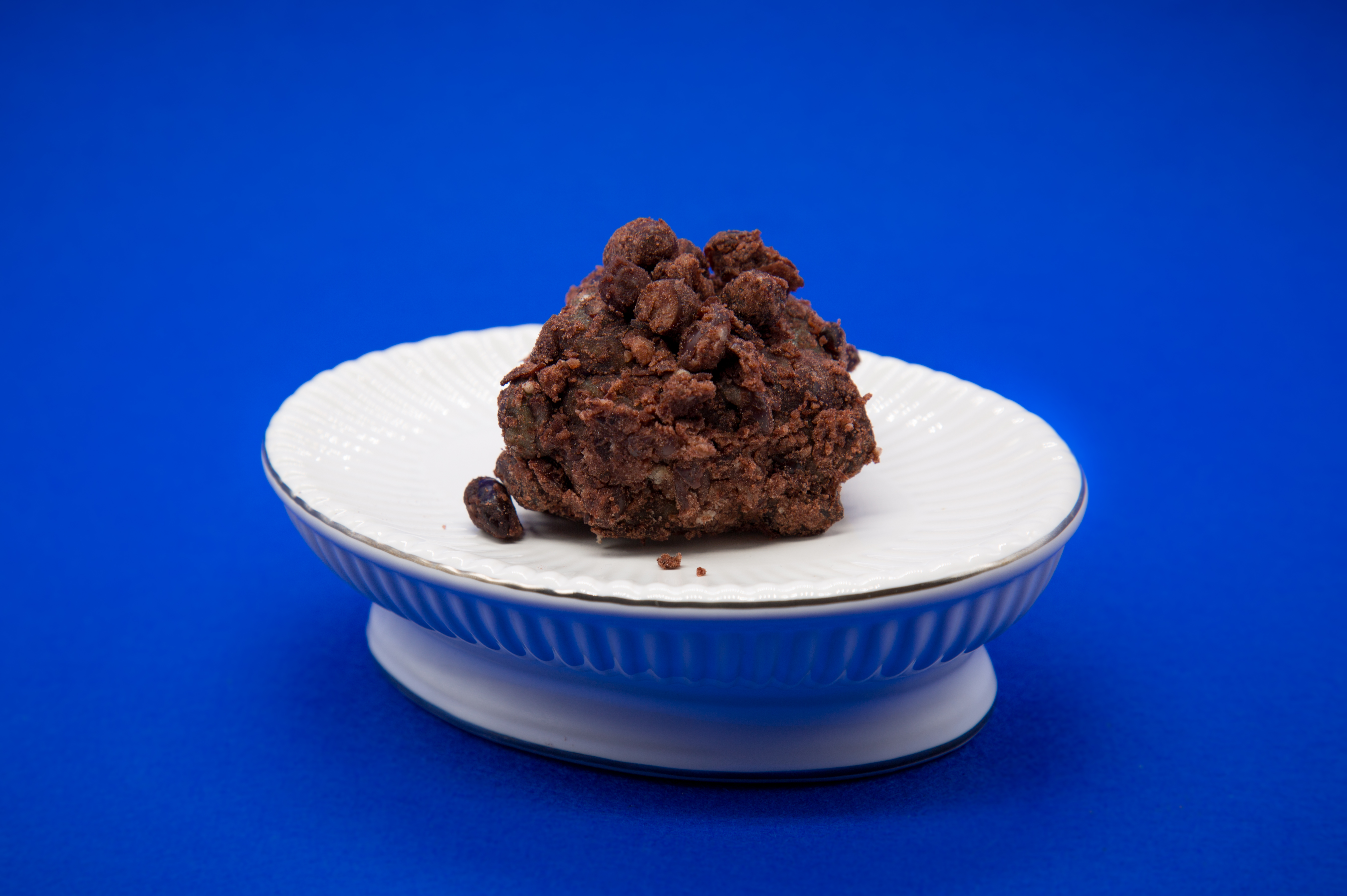 제주도 동문재래시장의 '진아떡집'에서 구매한 오메기떡의 정면 사진입니다.